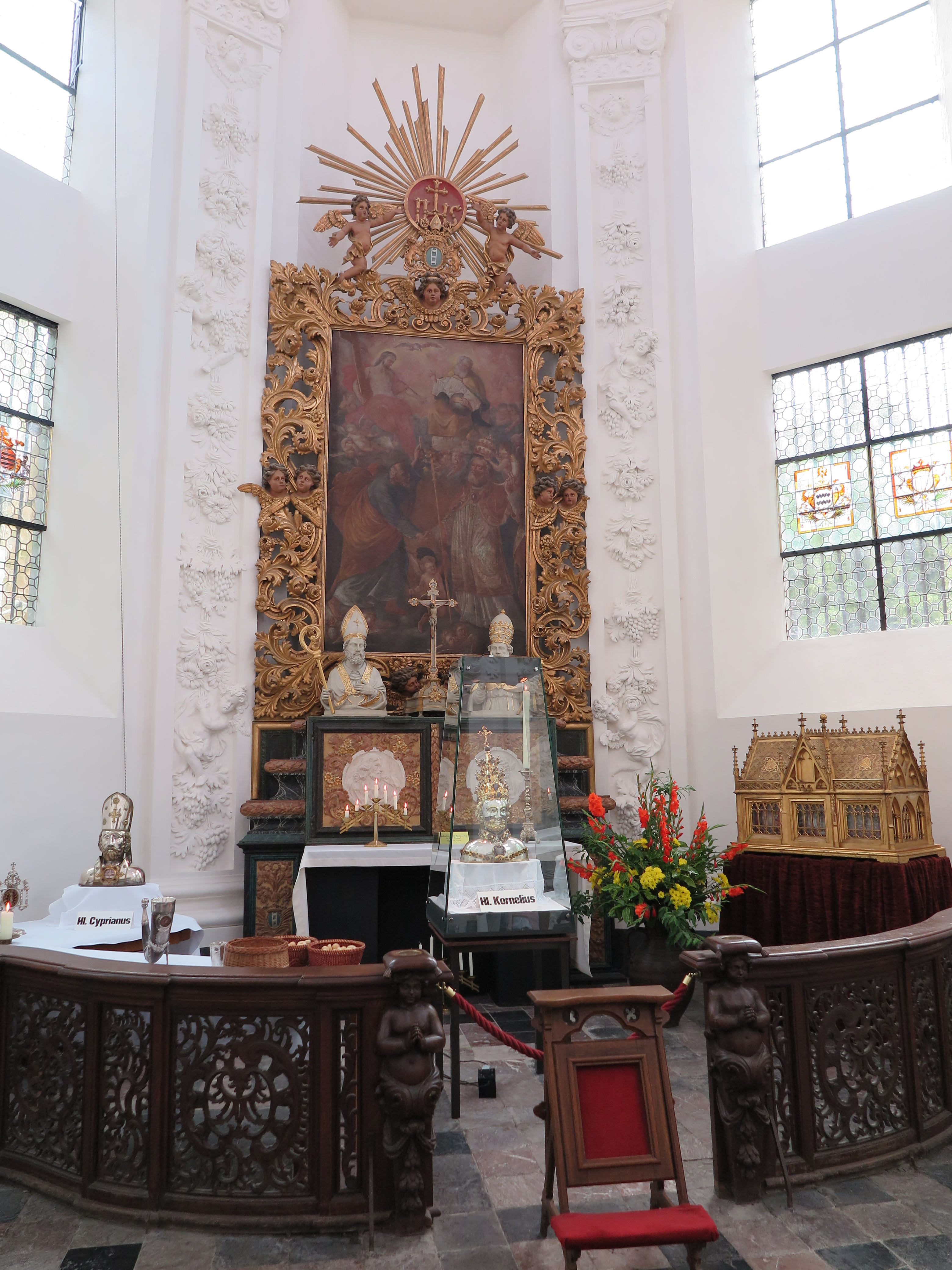 Korneliuskappelle der Propsteikirche St. Kornelius in Kornelimünster während der Heiligtumsfahrt Kornelimünster 2014. Vor dem Altar steht das Schädelreliquiar des heiligen Kornelius, links davon das Schädelreliquiar des heiligen Cyprianus.